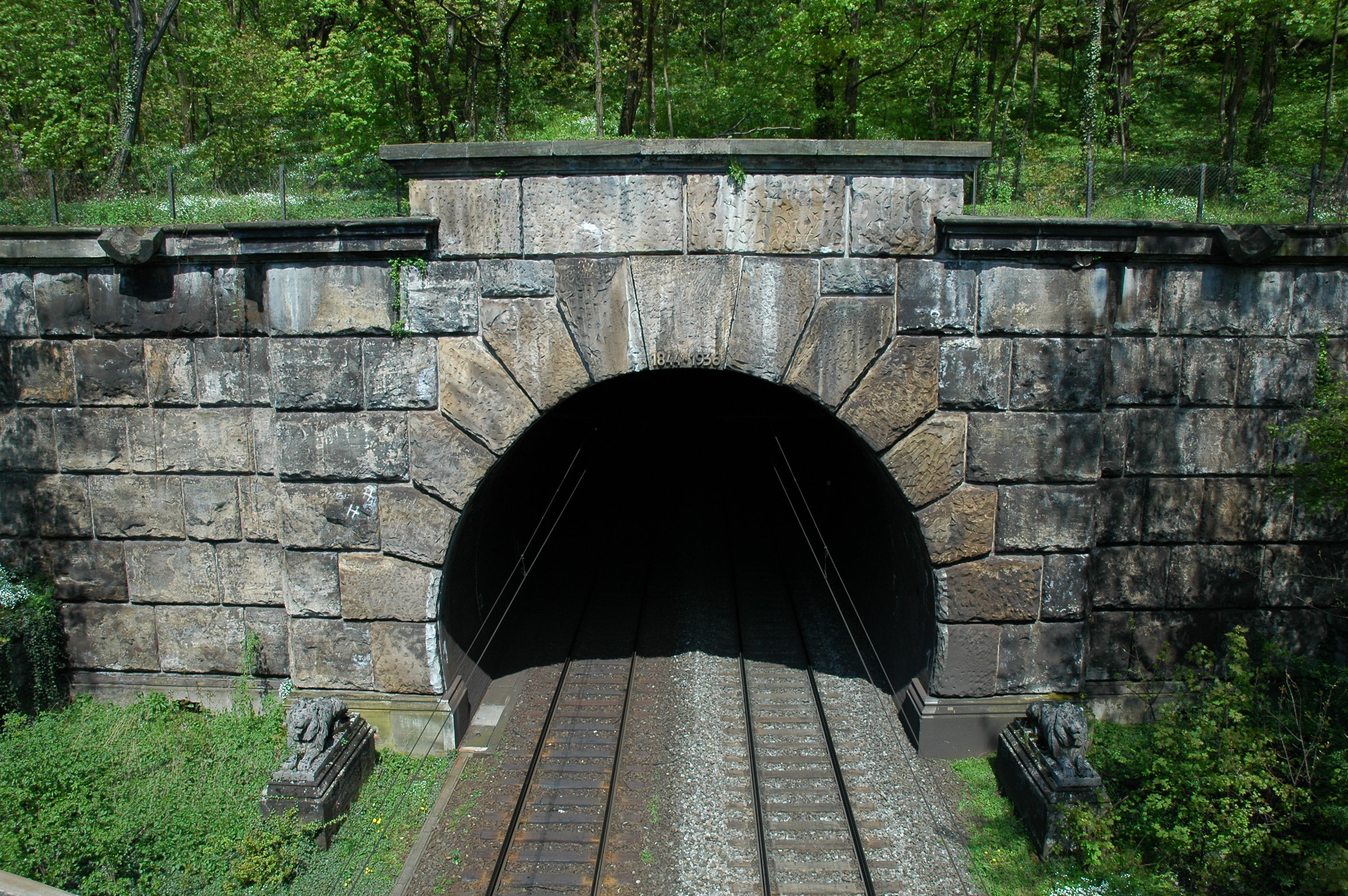 Südportal des alten Burgbergtunnels der Bahnstrecke Nürnberg–Bamberg bei Erlangen. Photographiert von der Straßenbrücke Bayreuther Straße.